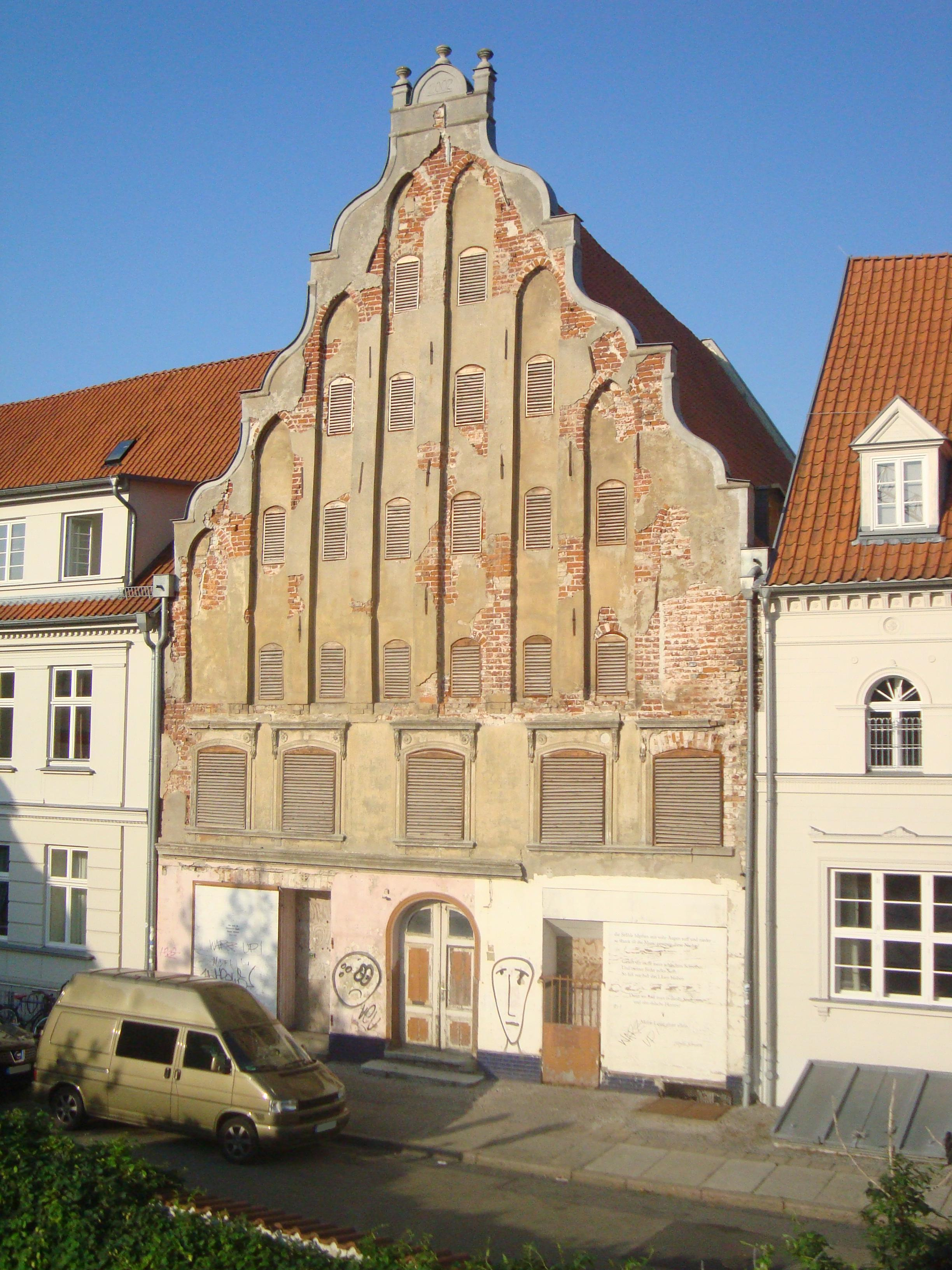 Wohnspeicherhaus in der Baderstraße 2 in Greifswald.